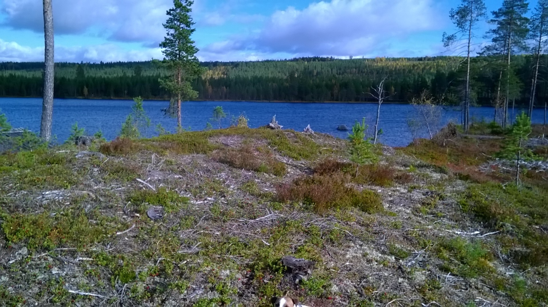 Vistekullen vid Lill-Kärmsjön.